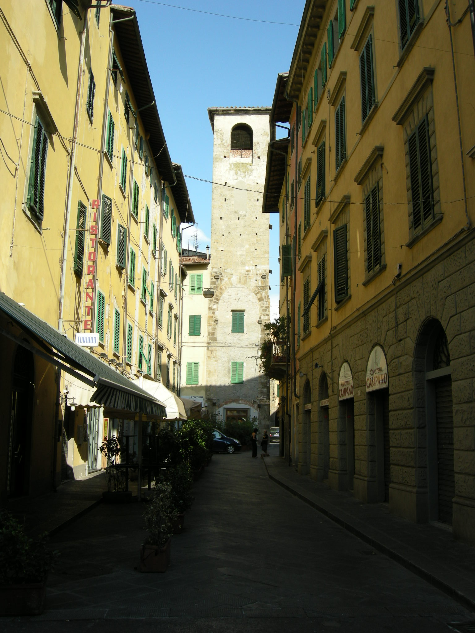 Torre del Campano